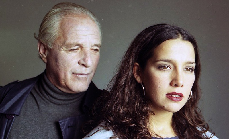 עזרא כפרי ולילה מרכוס, בסרטו של יוסף פיצ'חדזה בסמה מוצ'ו, 2001